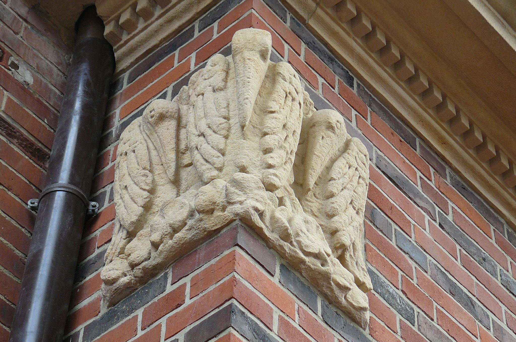 Szkołą przy ul. Słowackiego 54/60 w Poznaniu.